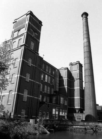 Royd Mill, Hollinwood